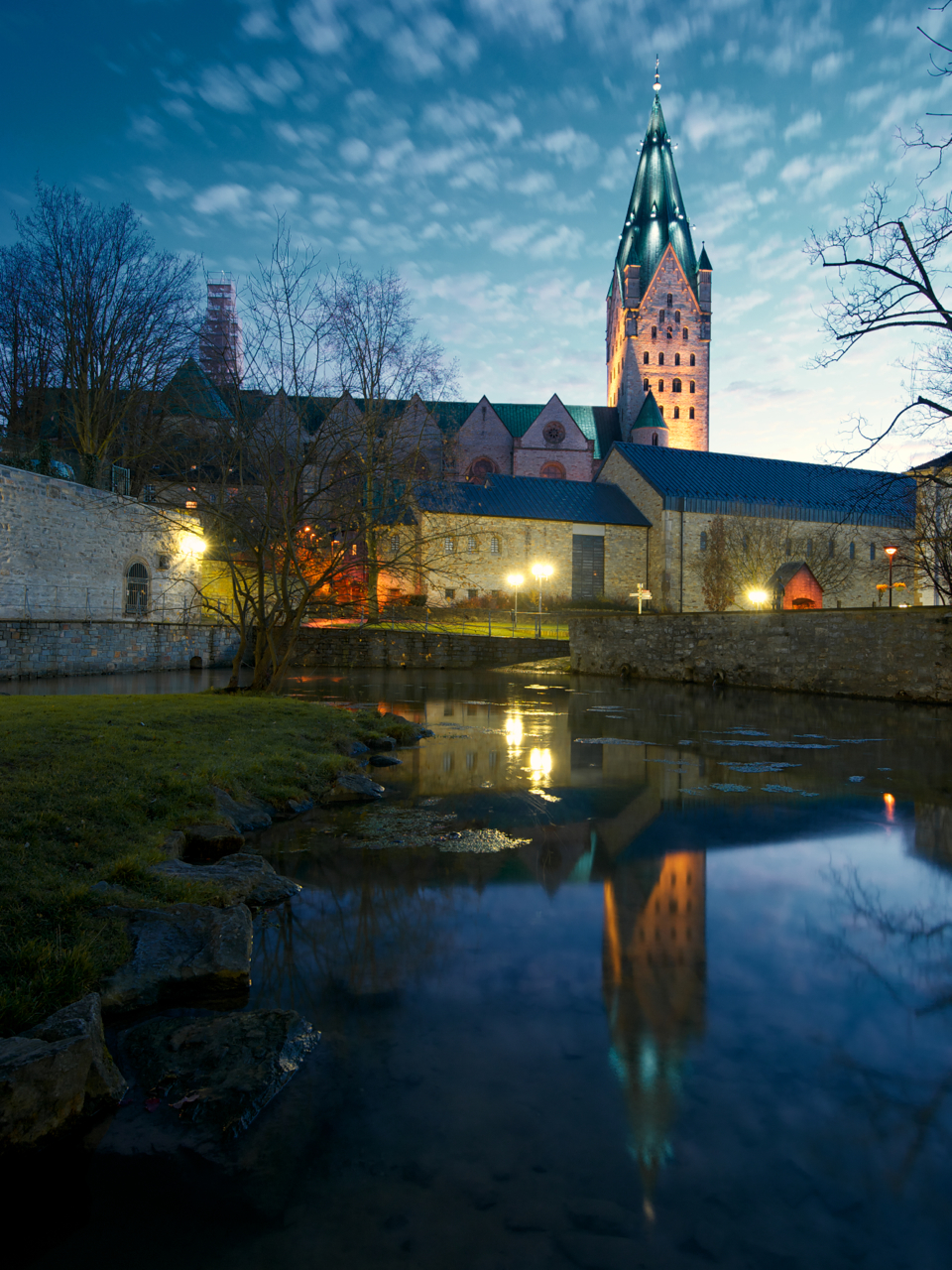 Quellbecken der Dielenpader, Kaiserpfalz und Dom (Nordseite) mit Beleuchtung zur Blauen Stunde im Advent.